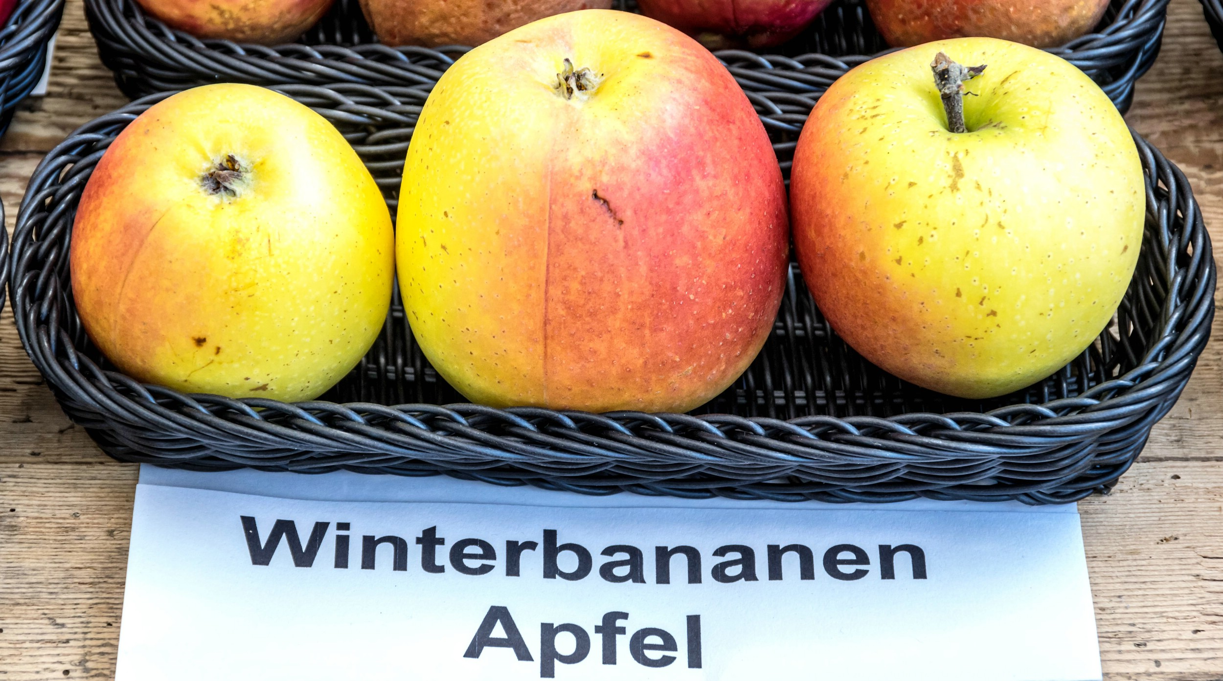 Alte Apfelsorten, von denen es im Badischen noch tragende Bäume gibt. Alle Aufnahmen au dem Oktober 2015